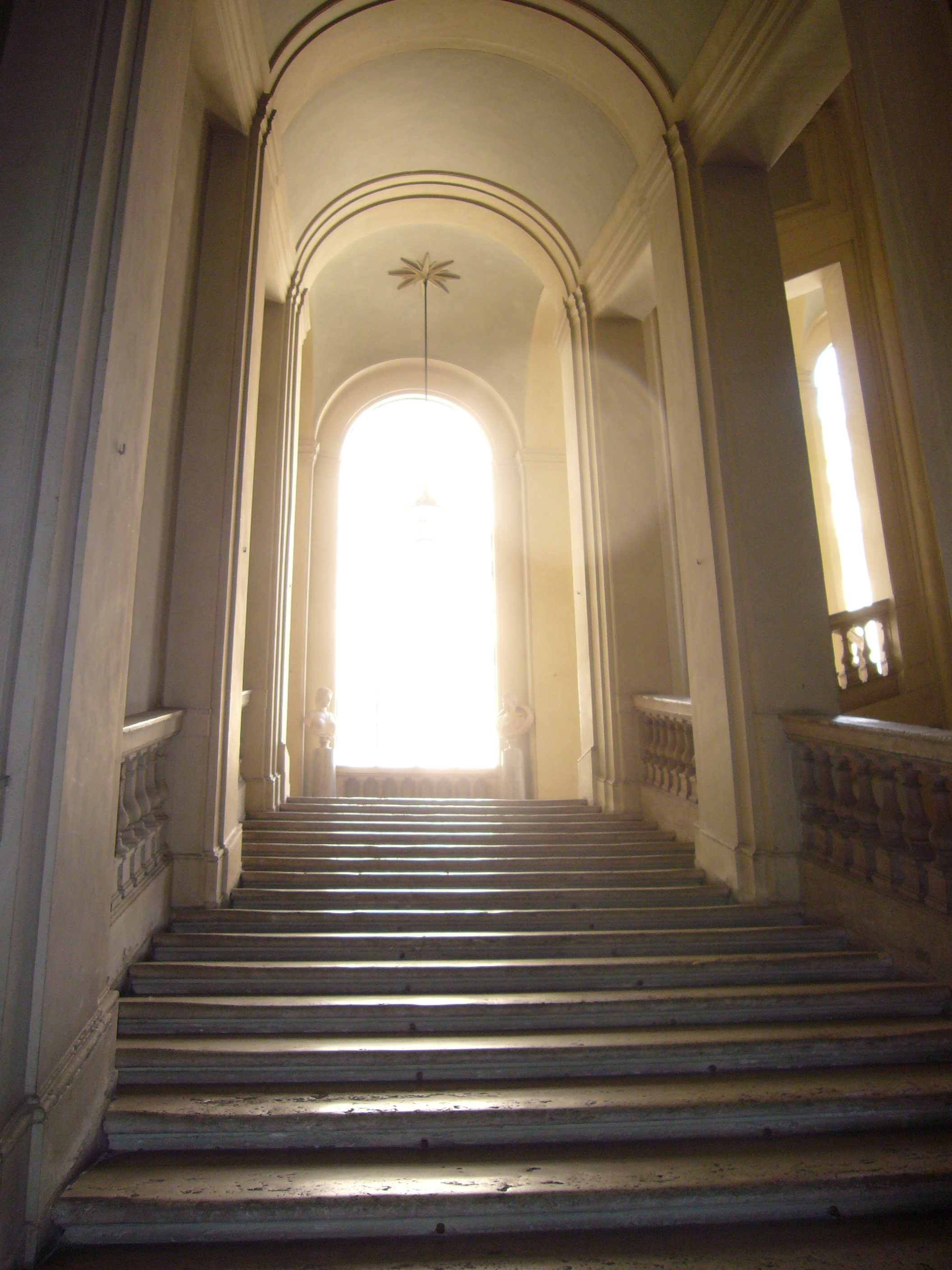 Roma, palazzo Altieri, lo scalone